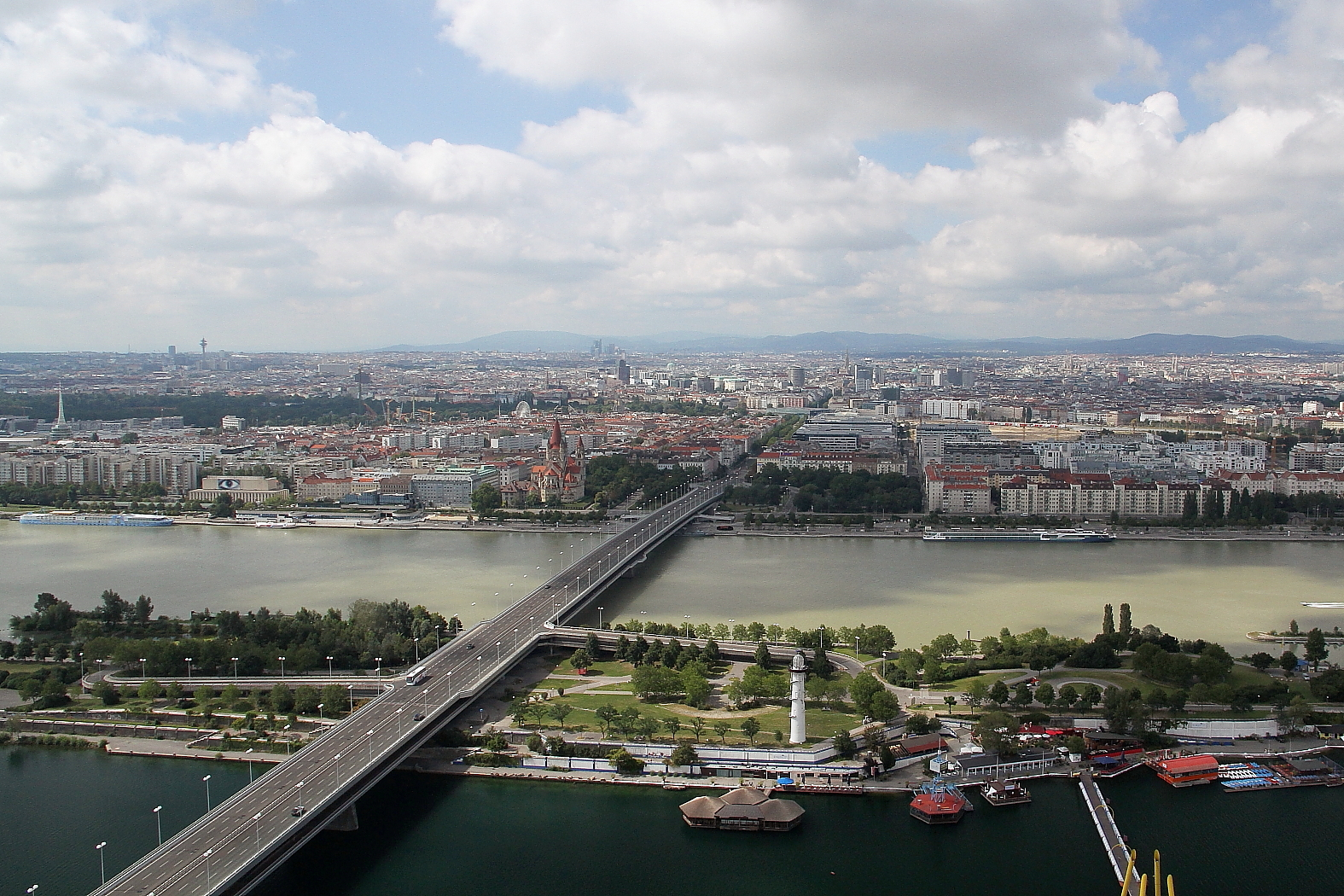 Die Reichsbrücke in Wien vom linken Donauufer aus gesehen; im Vordergrund die Donauinsel.